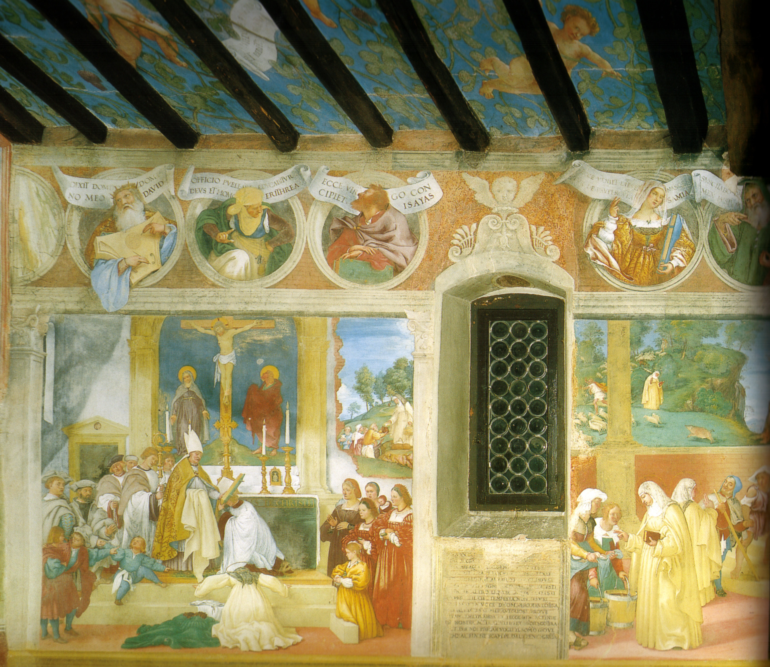 Lotto, affreschi di trescore